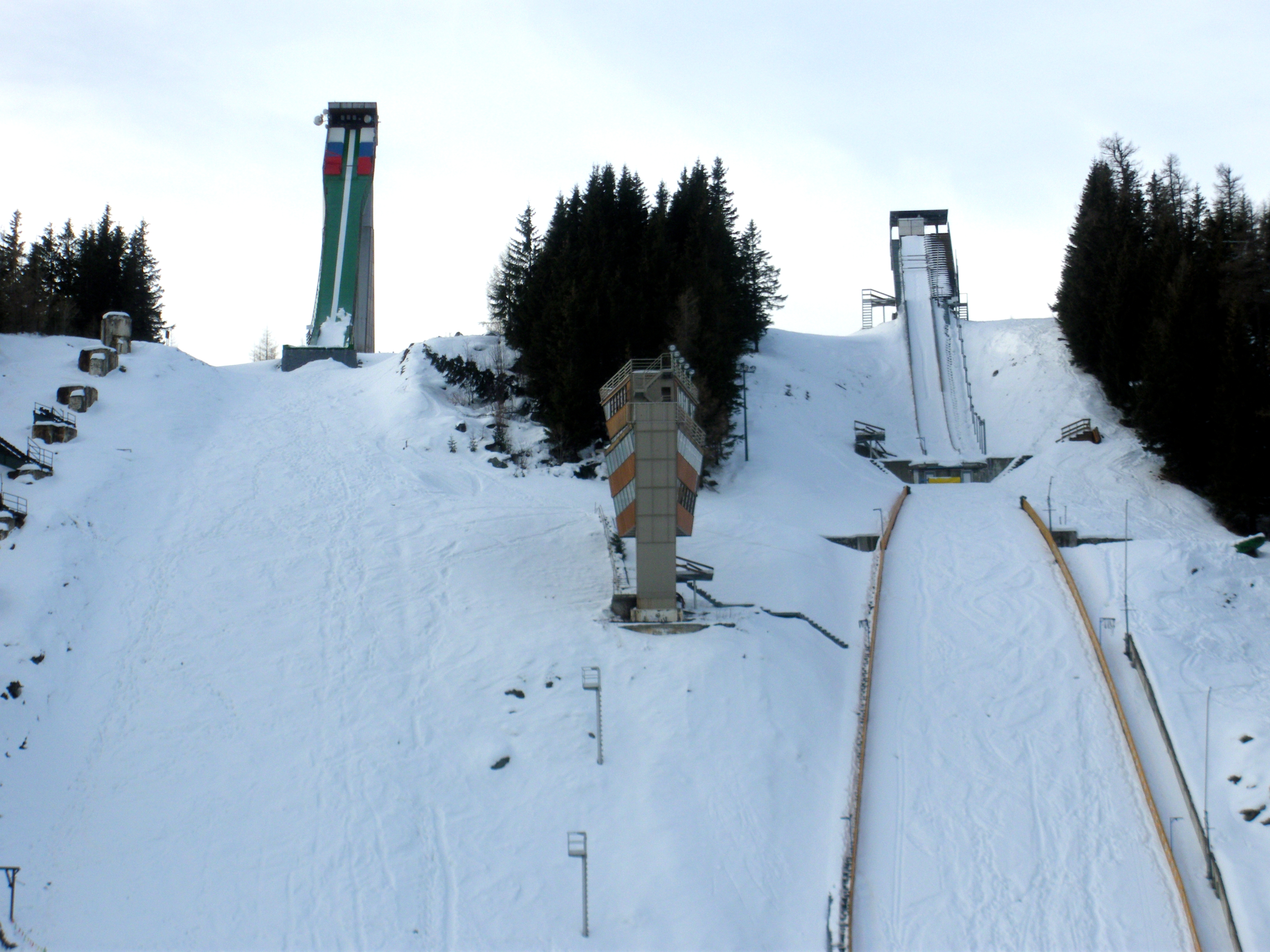 Lyžiarsky areál Štrbské Pleso / skokanské mostíky